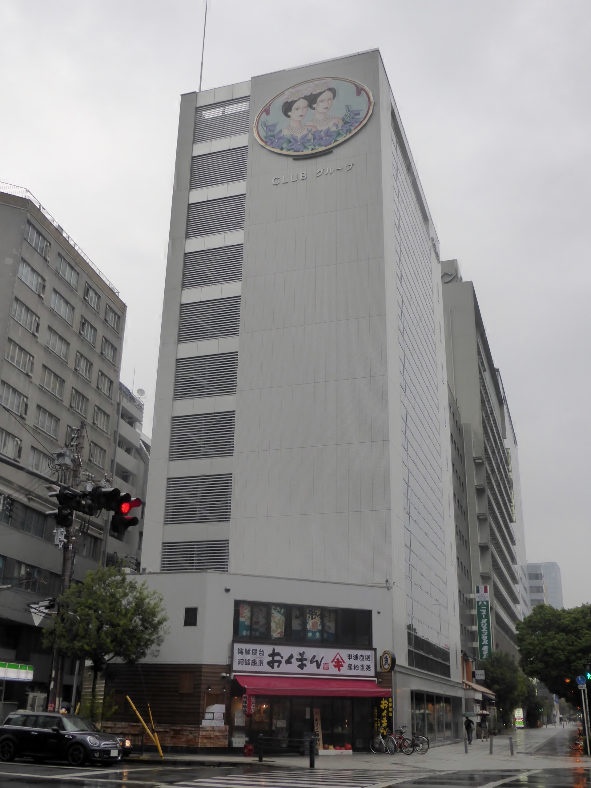 株式会社クラブコスメチックス本社を撮影。